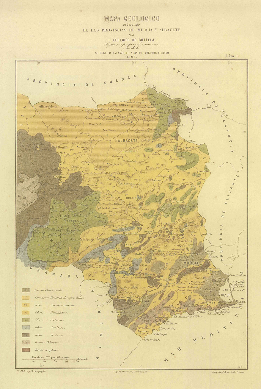 Mapa geológico en bosquejo de las provincias de Murcia y Albacete por Federico de Botella según sus propias observaciones y las de SS. Pellico, Naranjo, de Verneouil, Collomb y Prado.